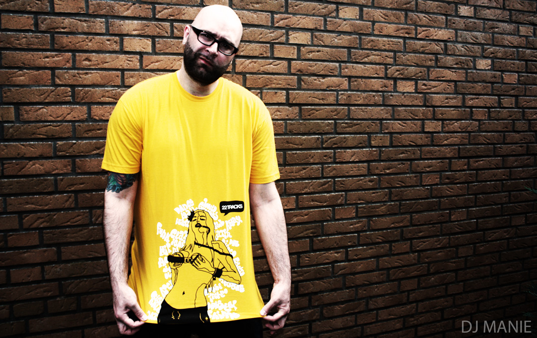 Dennis Rink, aka DJ Man!e